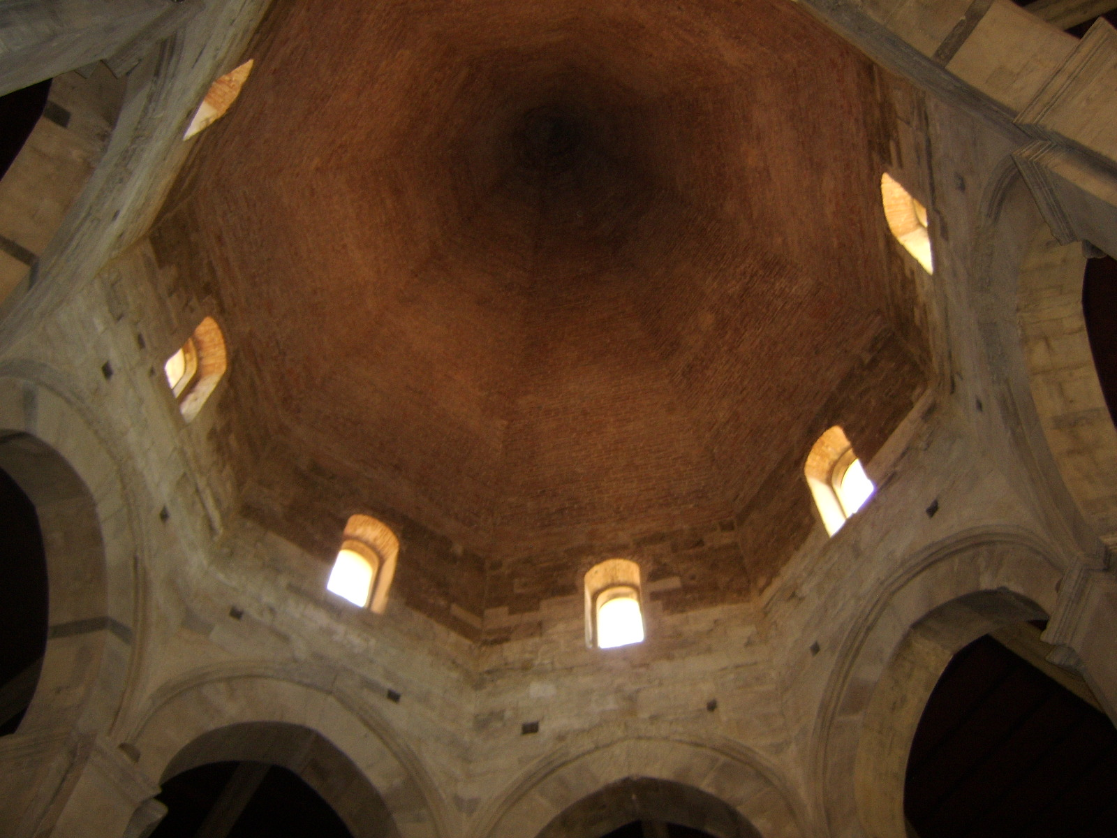 Pise, coupole de l'église du Saint-Sépulcre (XIIe.s).